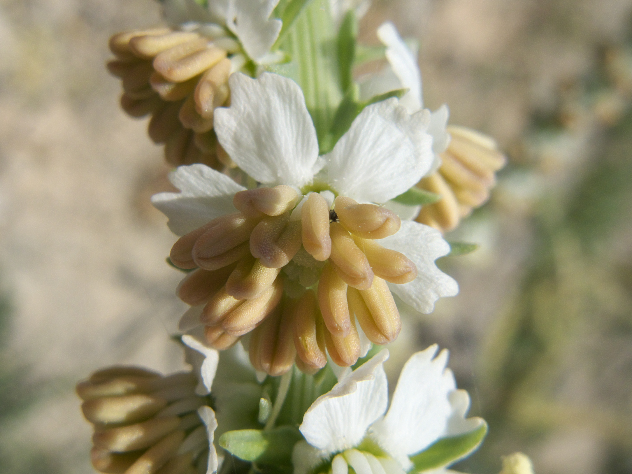 Flor de Reseda suffruticosa (Rivas Vaciamadrid, Madrid)